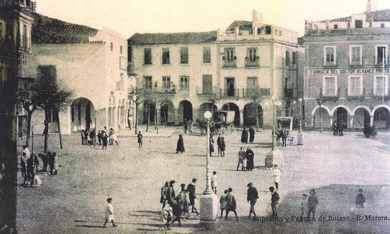 Plaza Grande de Zafra en 1900